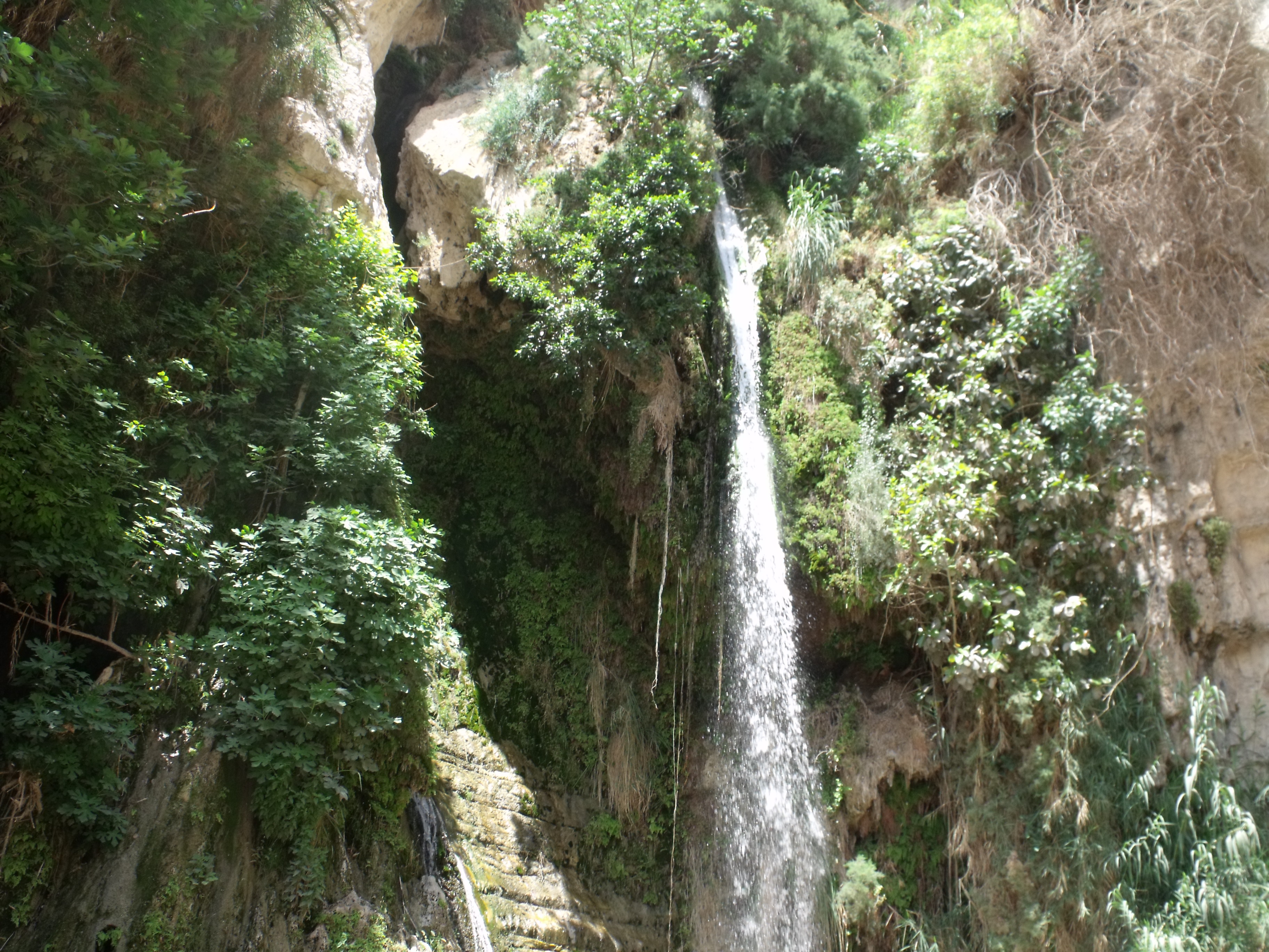 נחל בשמורת עין גדי.